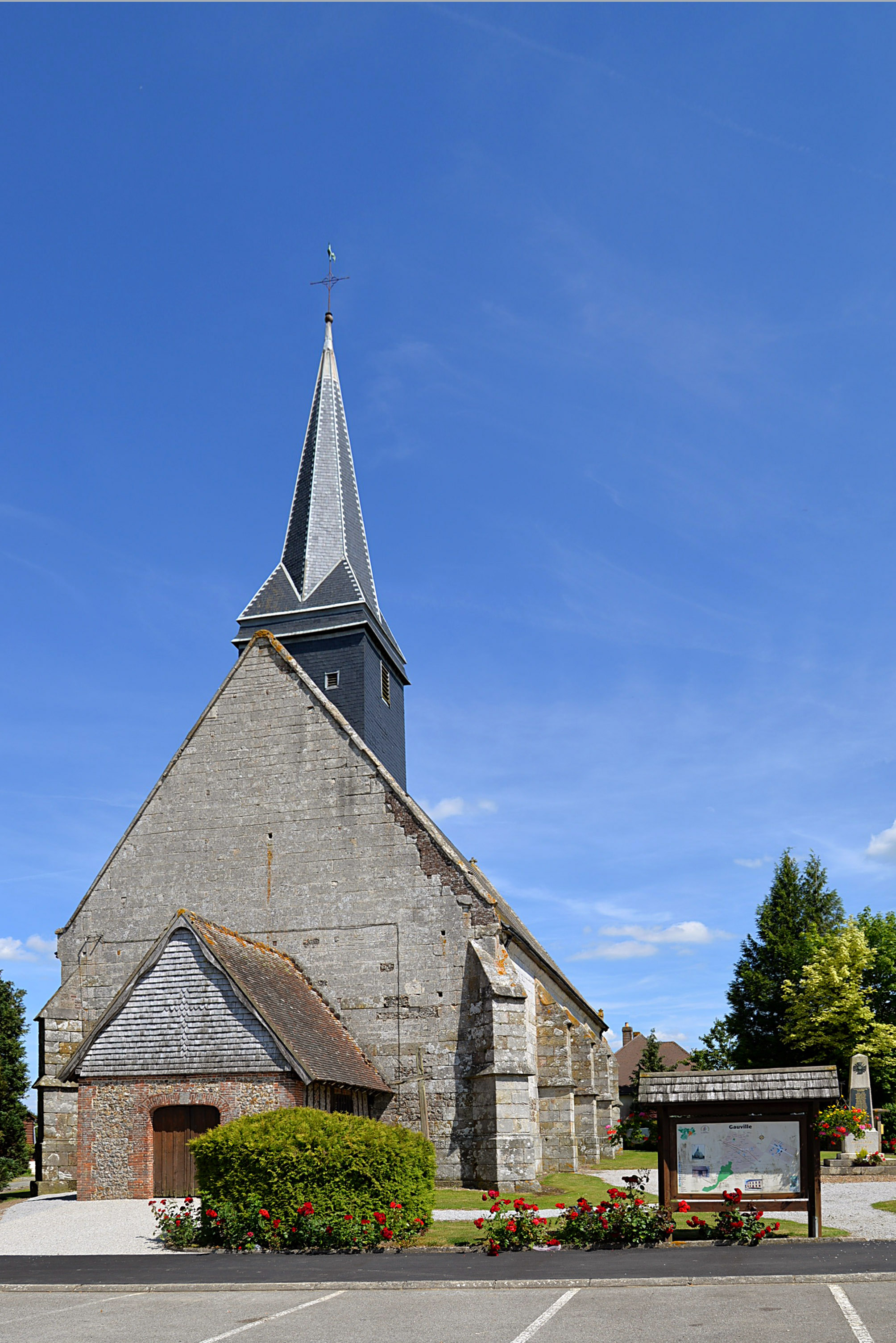 Gauville (Orne)